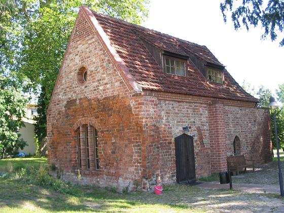 Kloster Lehnin, Brandenburg, Torkapelle